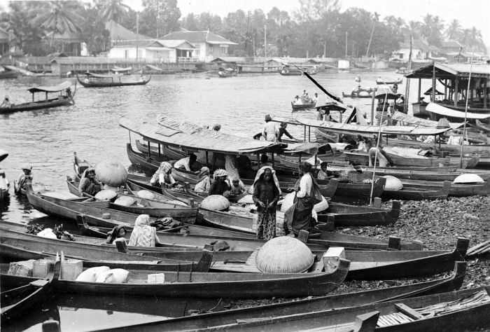 Repronegatief. Prauwenvloot bij Bandjermasin